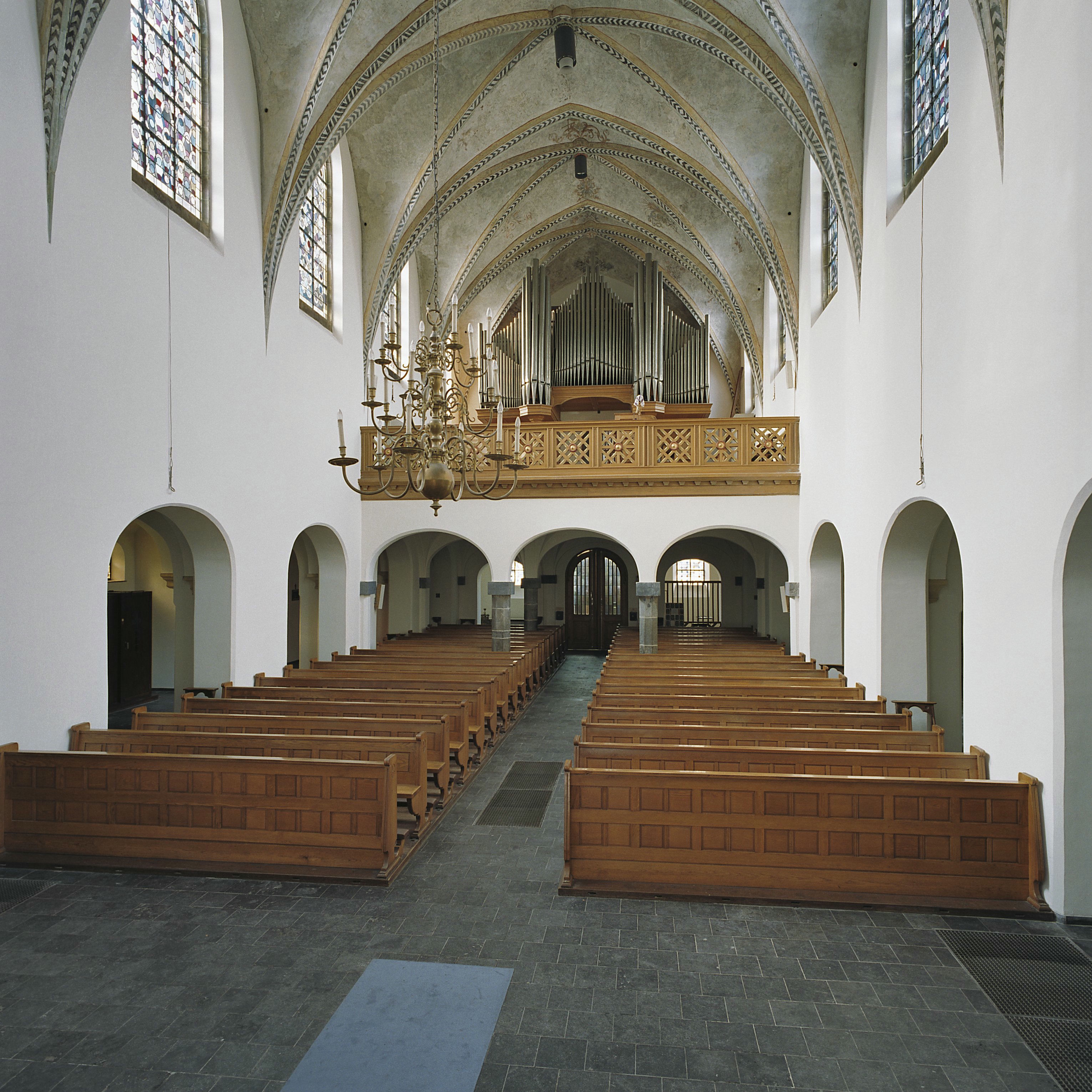 Klooster Mariaweide: Interieur, kerk naar het westen met orgel